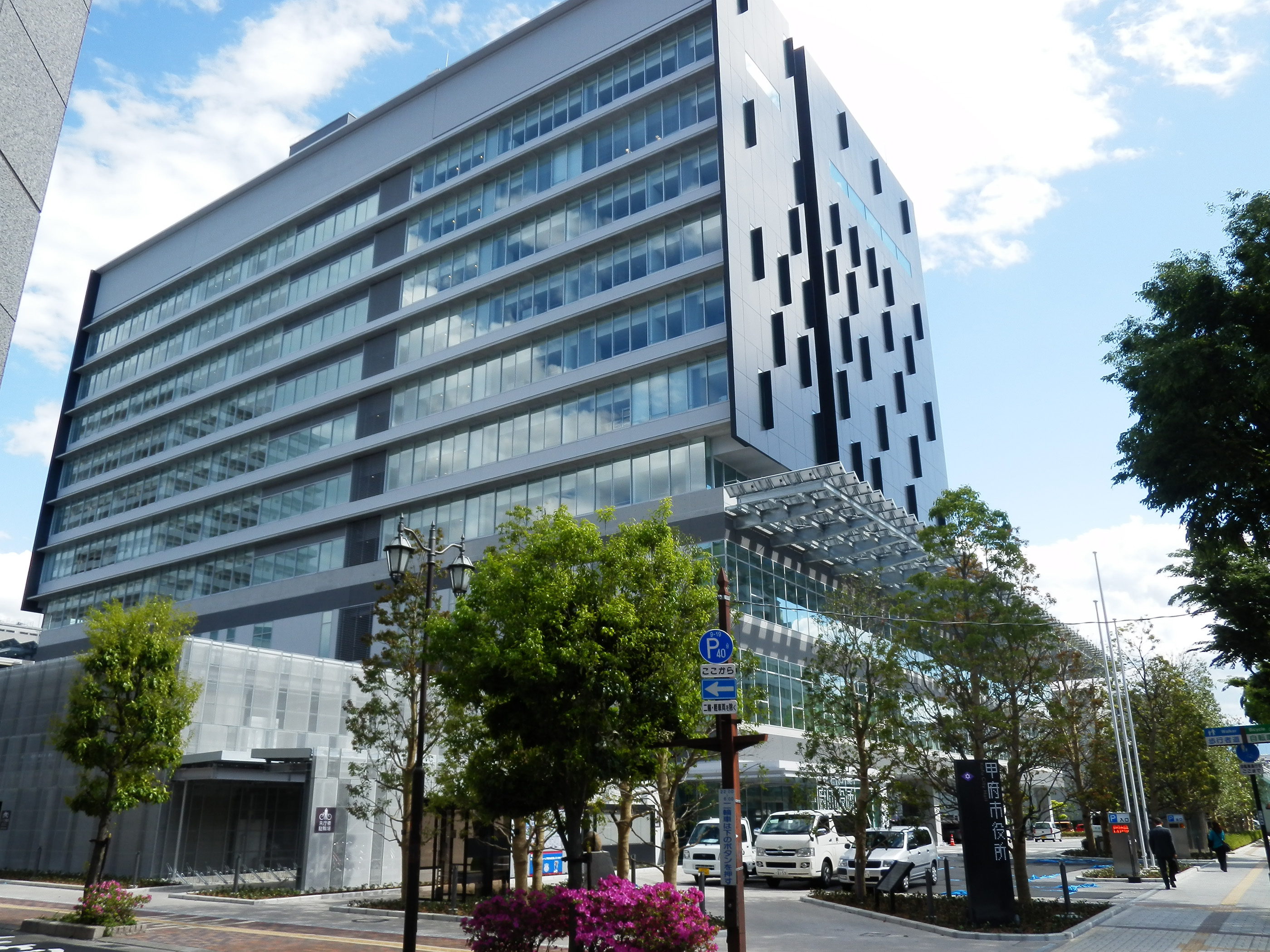 甲府市役所（2013年5月2日撮影）